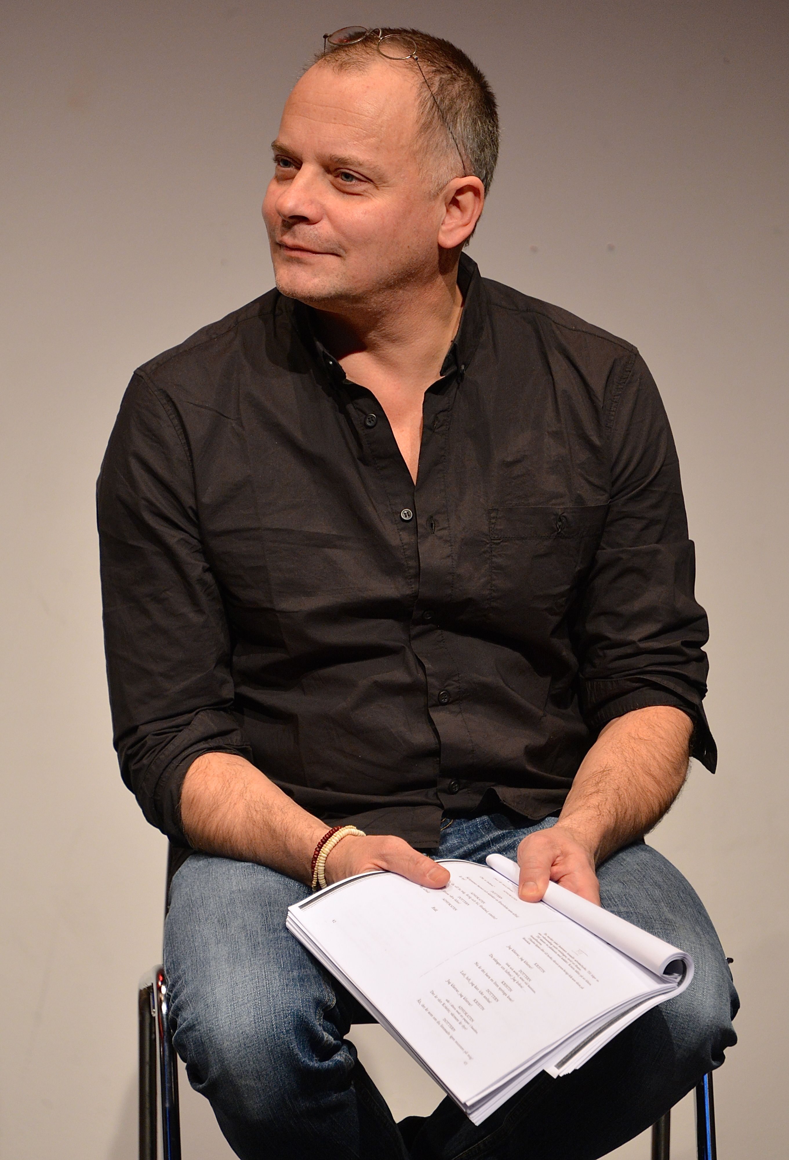 Gerhard Hoberstorfer i ett framträdande under Strindbergsårets sista dag, den 20 januari 2013 i Kulturhuset i Stockholm.